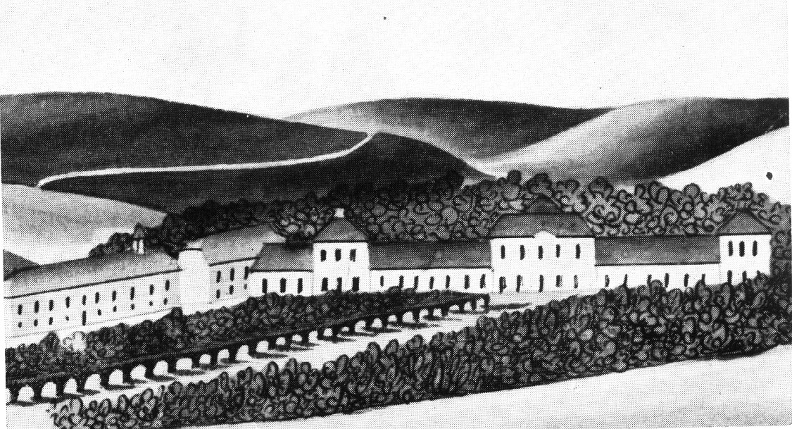 Schlos Pettersheim, Aquarell, 18. Jh.